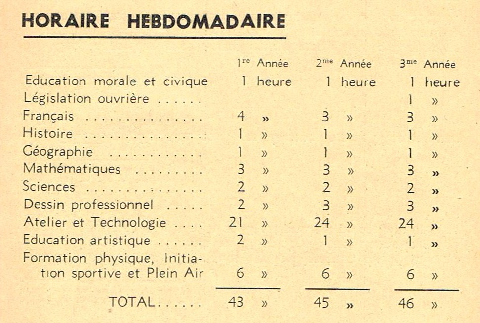 Horaire hebdomadaire pour chacune des trois années de scolarité du centre d'apprentissage Georges Lamarque de Nice (Alpes Maritimes)